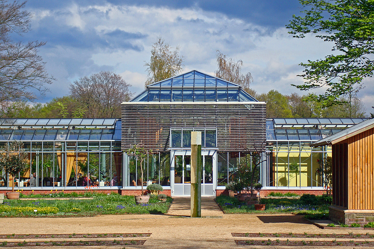 Palmenhauscafé im Botanischen Garten Gütersloh